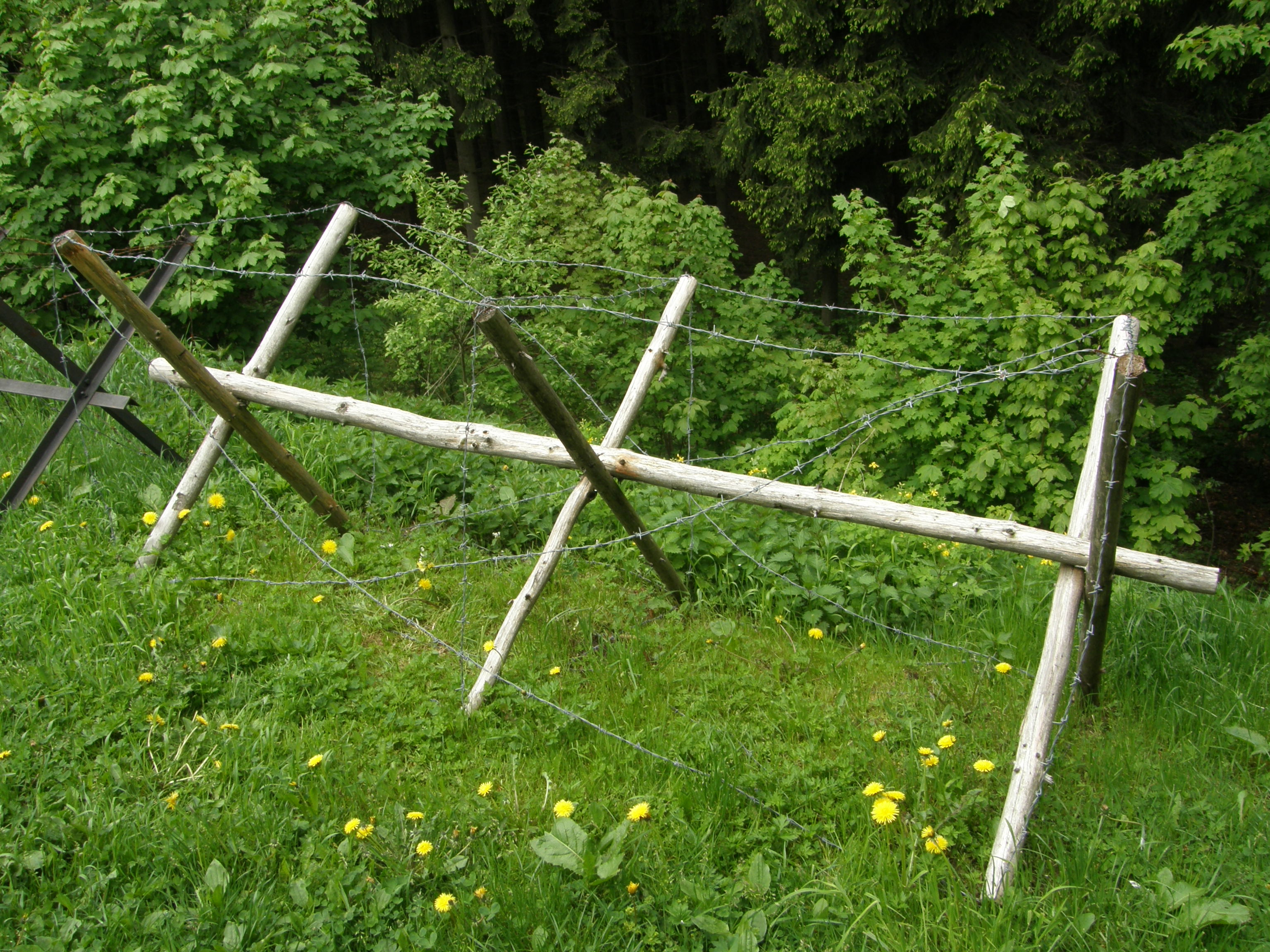 Spanelsky jezdec (dreveny)